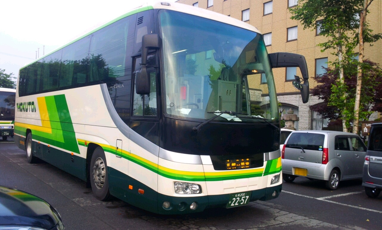 いすゞ・ガーラSHD 都市間高速仕様 北都交通「札幌200 か・22-57」